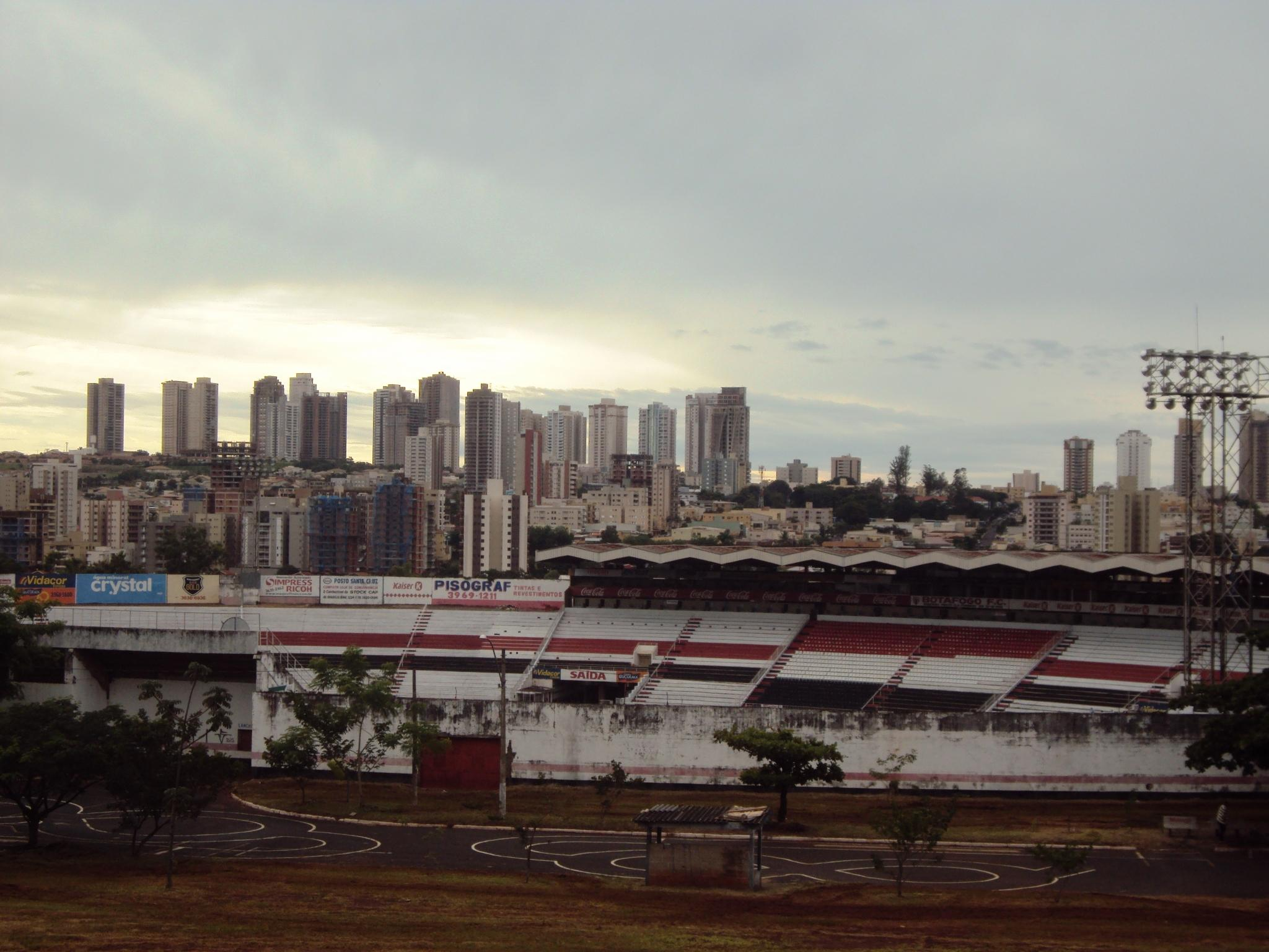 Estádio Santa Cruz, do Botafogo Futebol Clube de Ribeirão Preto, estado de São Paulo